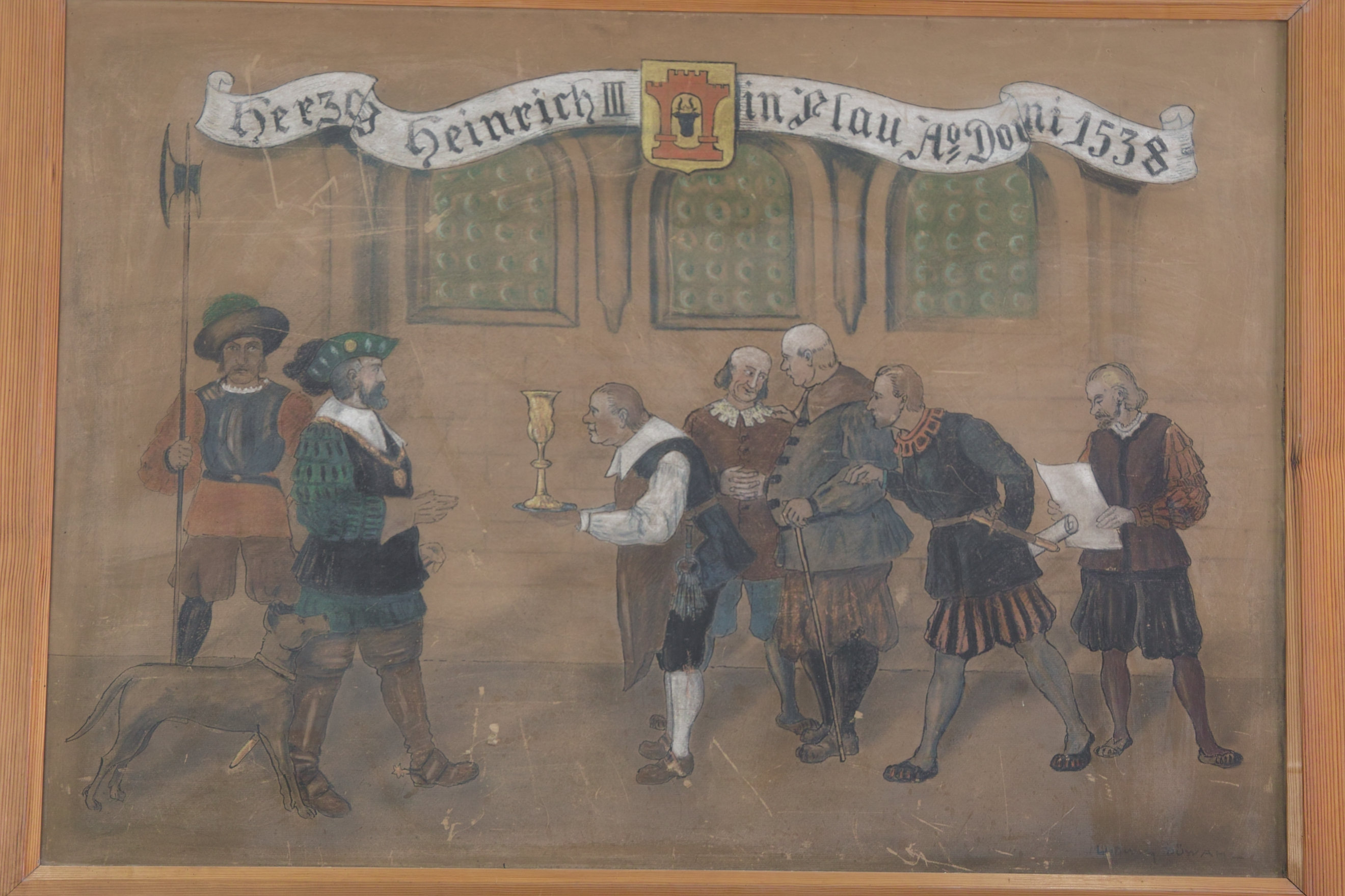 Gemälde über ein historisches Ereignis in Plau, ausgestellt im Burgmuseum Plau am See.